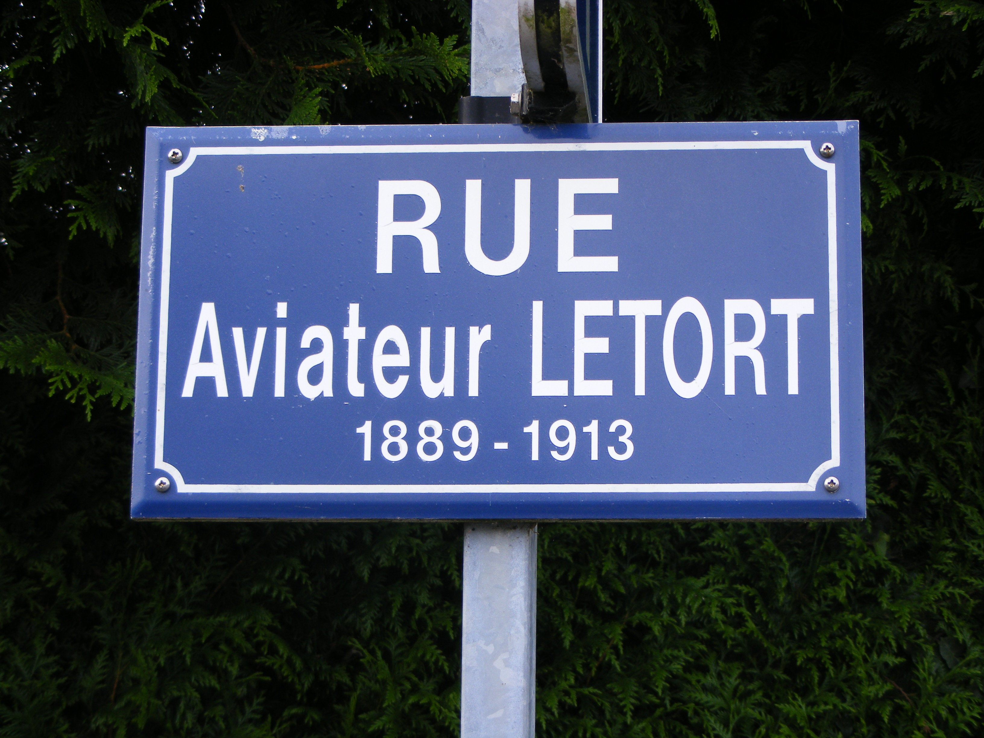 Rue de l'aviateur LETORT à Piré-sur-Seiche (35)